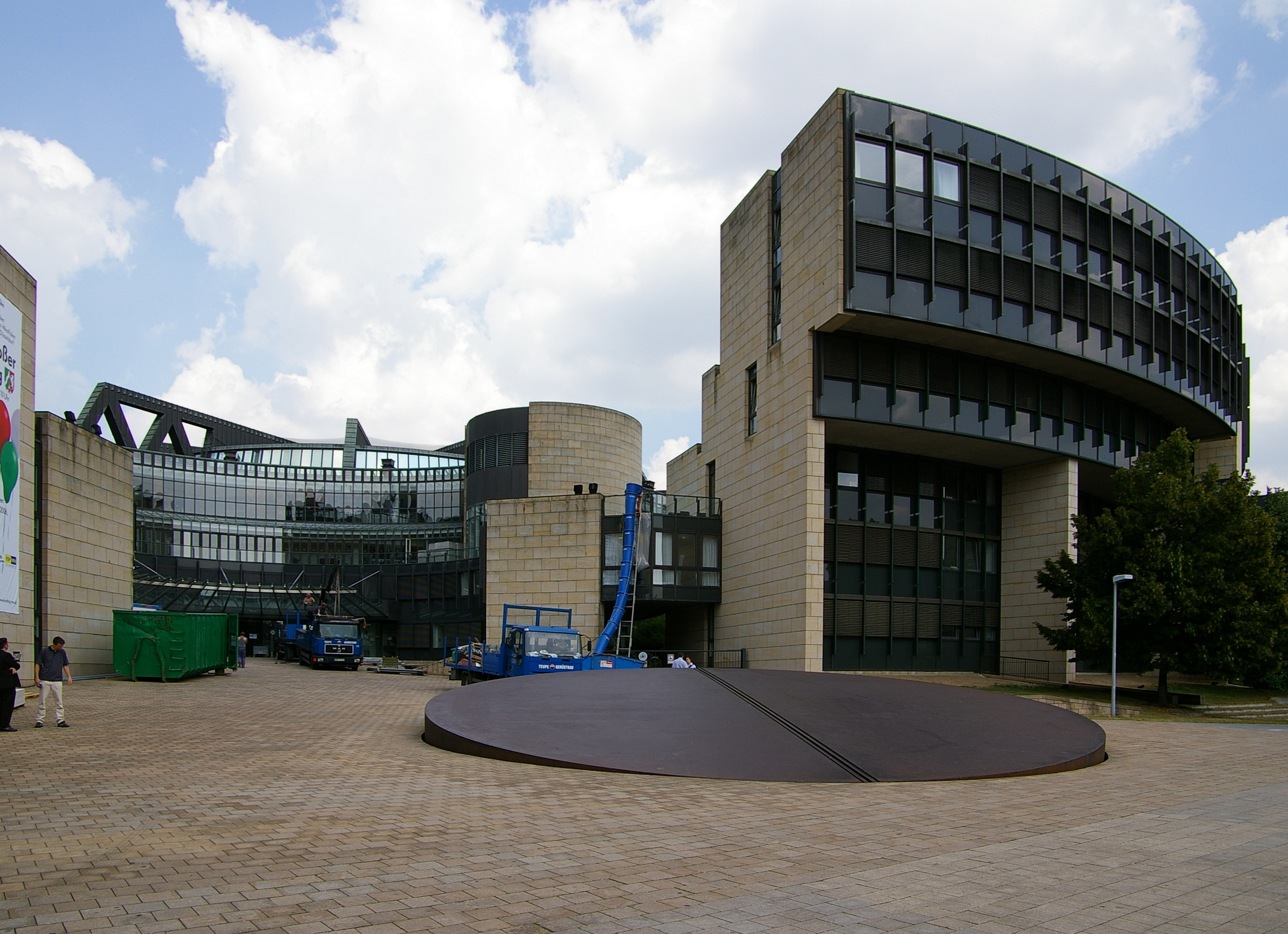 Genehmigung: GFDL (Version 1.2, November 2002), kein wie auch immer geartetes "Gentlemen-Agreement". Bildnutzung ohne Einhaltung der Bestimmungen der GFDL ist kostenpflichtig und wird vom Rechteinhaber in Rechnung gestellt. Zweitlizensierung ggf. auch unentgeltlich auf Anfrage. Es gelten die AGB. Motiv: Mobile Oper am Rhein in Düsseldorf